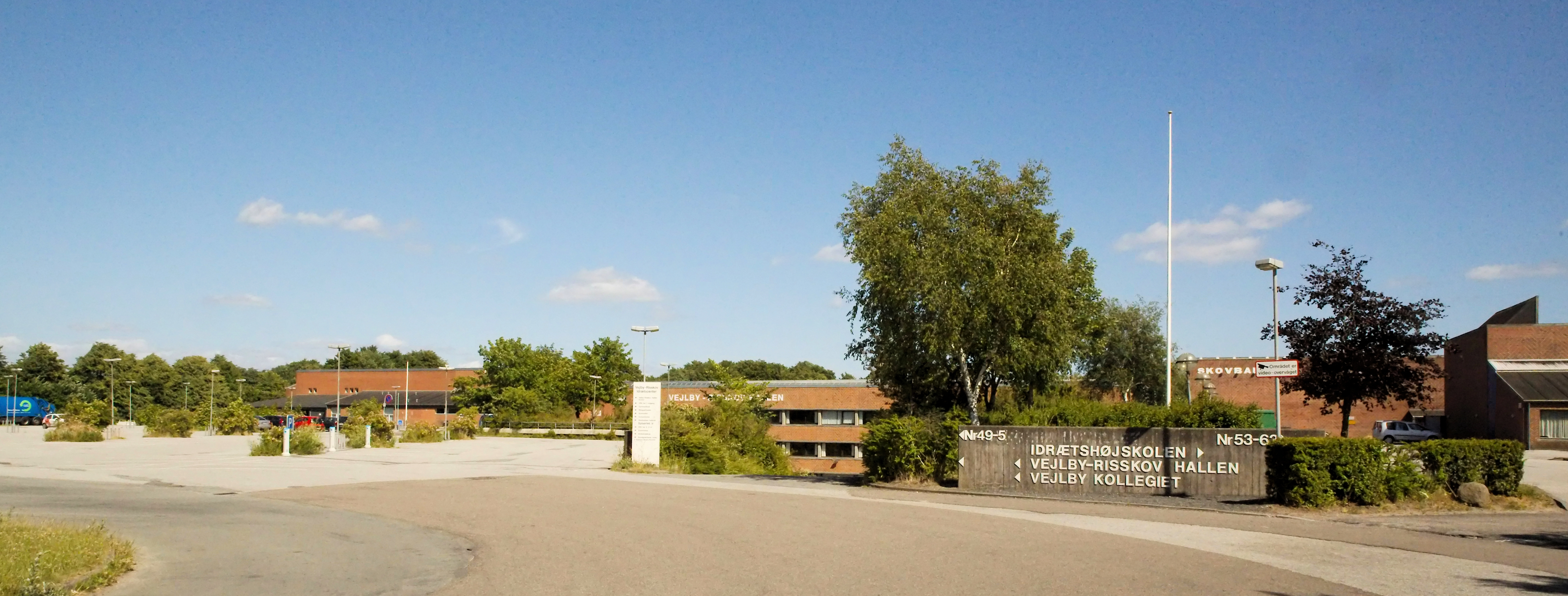 Vejlby/Risskov Centret